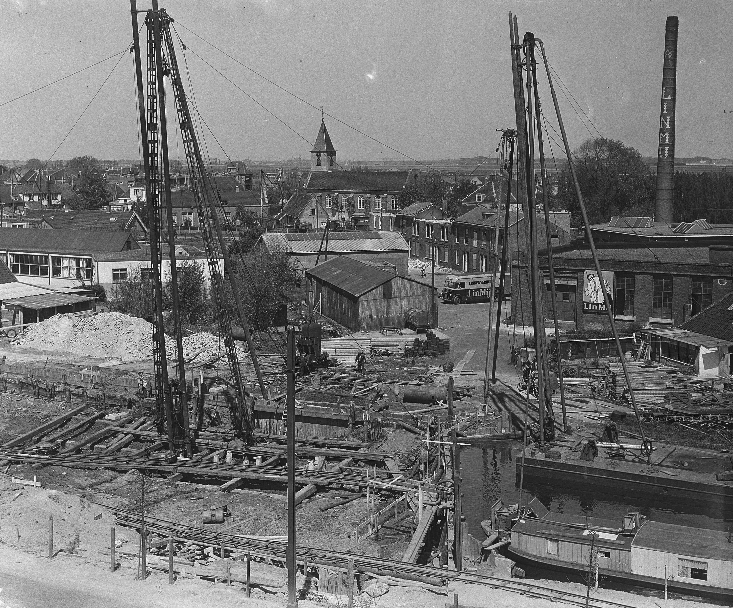 Collectie / Archief : Fotocollectie Anefo Reportage / Serie : [ onbekend ] Beschrijving : Bouw van brug voor station Sloterdijk Datum : 2 juni 1955 Locatie : Amsterdam, Noord-Holland, Sloterdijk Trefwoorden : bruggenbouw Fotograaf : Bilsen, Joop van / Anefo Auteursrechthebbende : Nationaal Archief Materiaalsoort : Glasnegatief Nummer archiefinventaris : bekijk toegang 2.24.01.09 Bestanddeelnummer : 907-1662